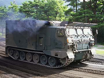 99式弾薬給弾車は、99式自走155mmりゅう弾砲用の弾薬および装薬を積載し、自走砲に給弾するために使用するものである。12年度から調達を開 始。